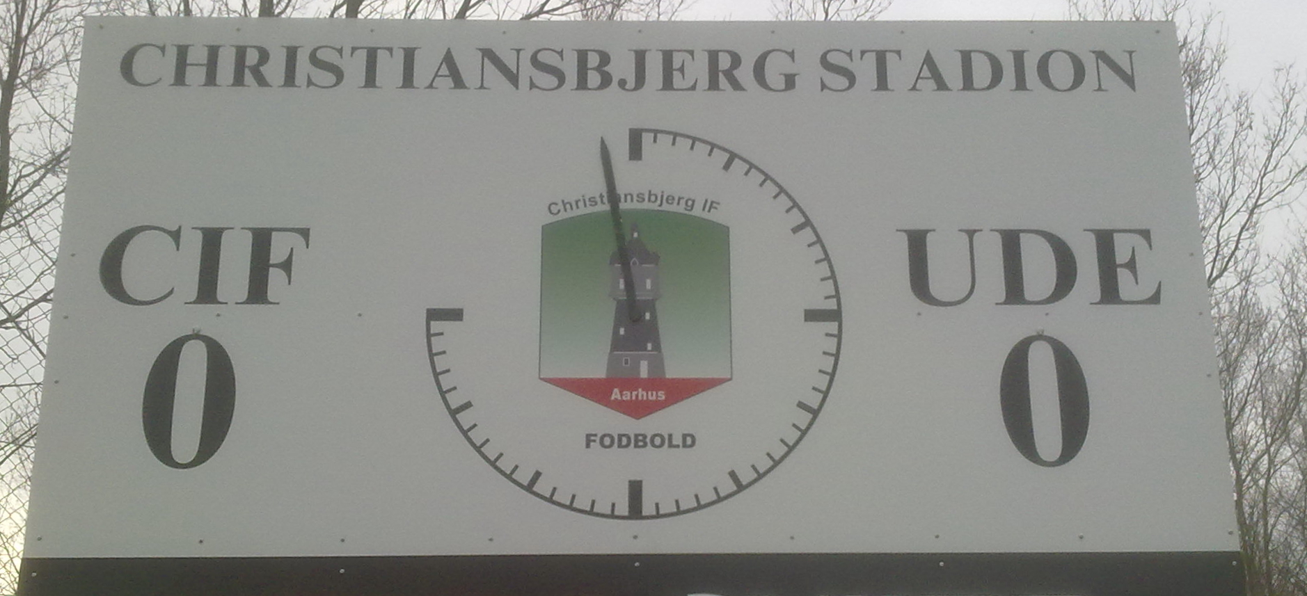 Scoringtavle med Christiansbjerg IF's logo.